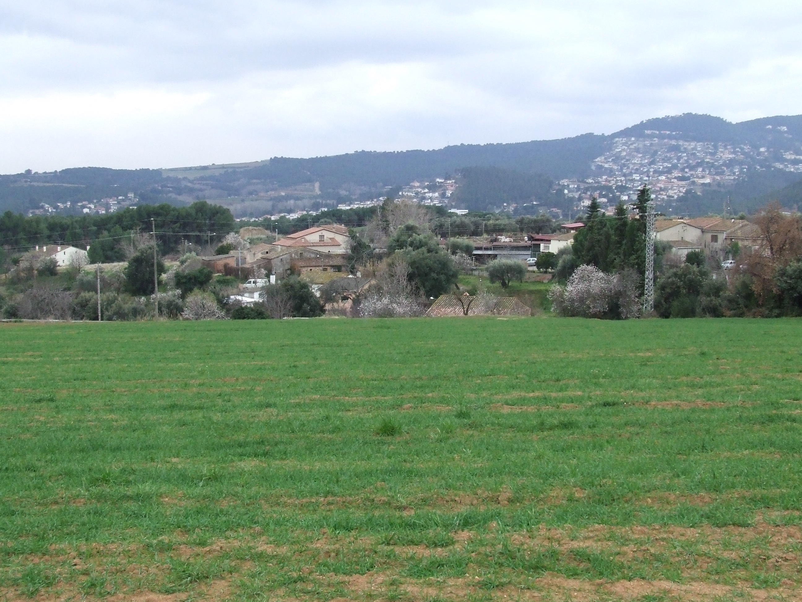 Vallroja i el Pla, des del nord-est (Bigues, Bigues i Riells, Vallès Oriental)